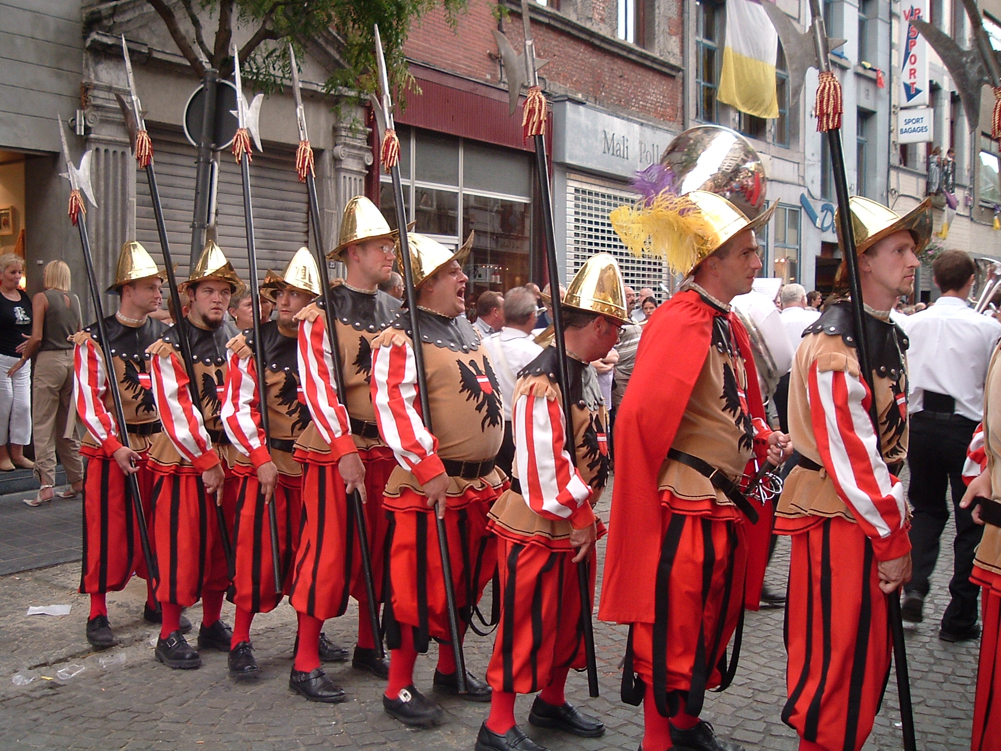 Les hallebardiers, ducasse d'Ath 2005